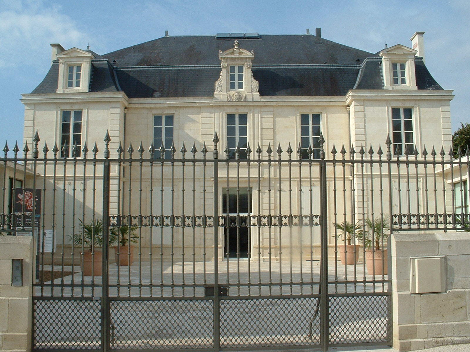 Musée des Cordeliers de St Jean d'Angely (Charente-Maritime - France).